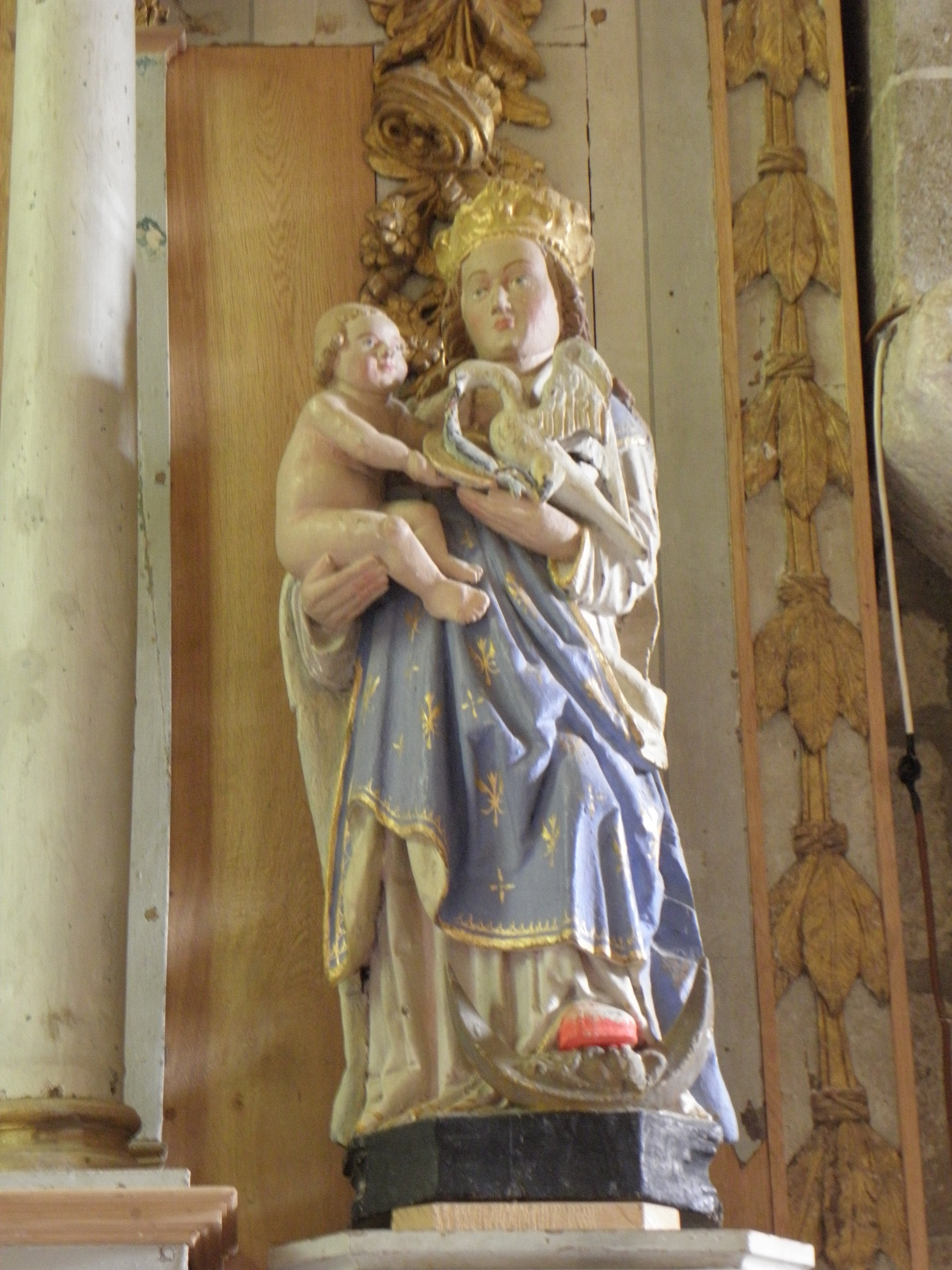 Intérieur de l'église Saint-Guénolé de Locquénolé (29). Autel et retable du Rosaire. Statue de la Vierge à l'Enfant.